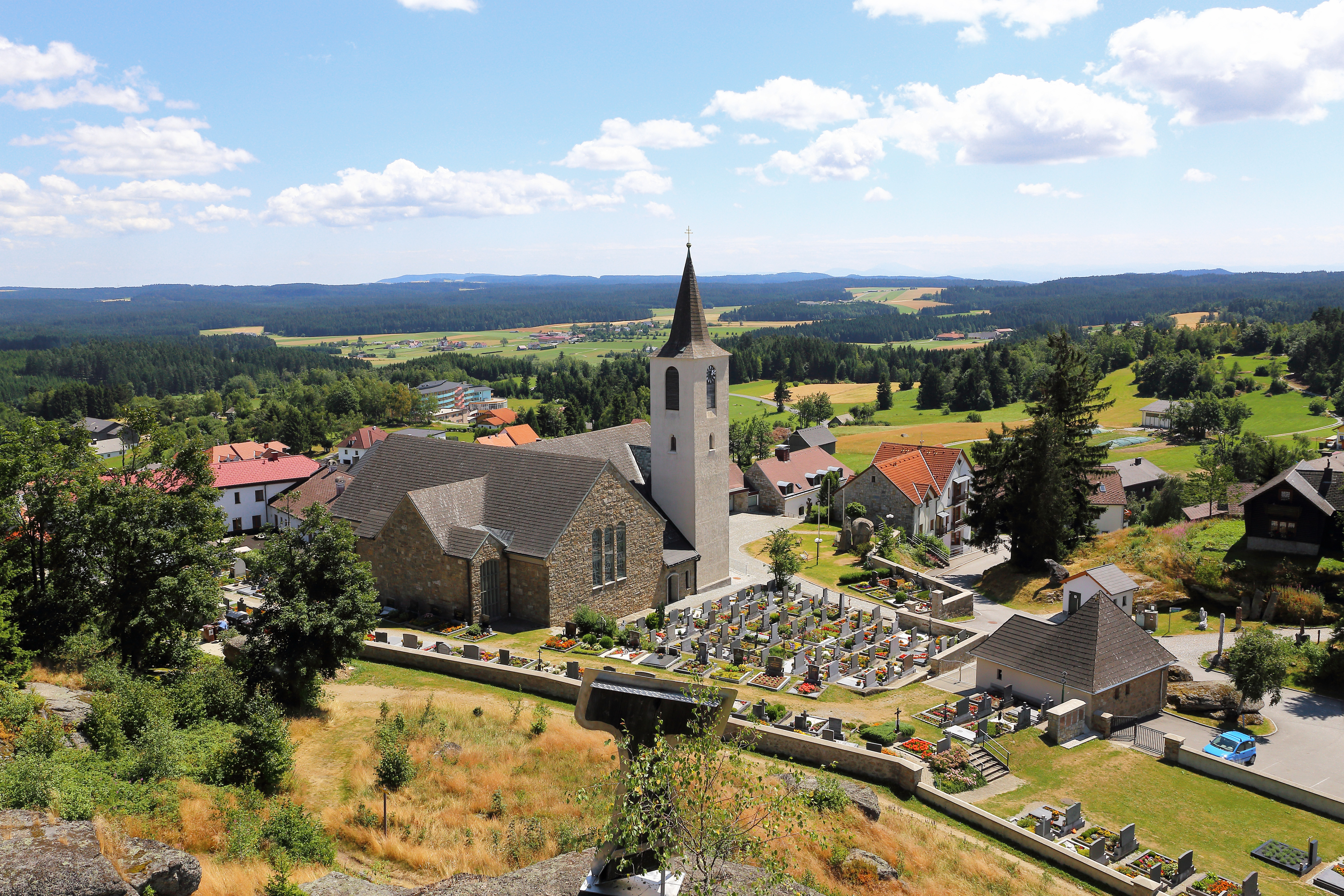 Blick über Bad Traunstein. In der Bildmitte die kath. Pfarrkirche hl. Georg.